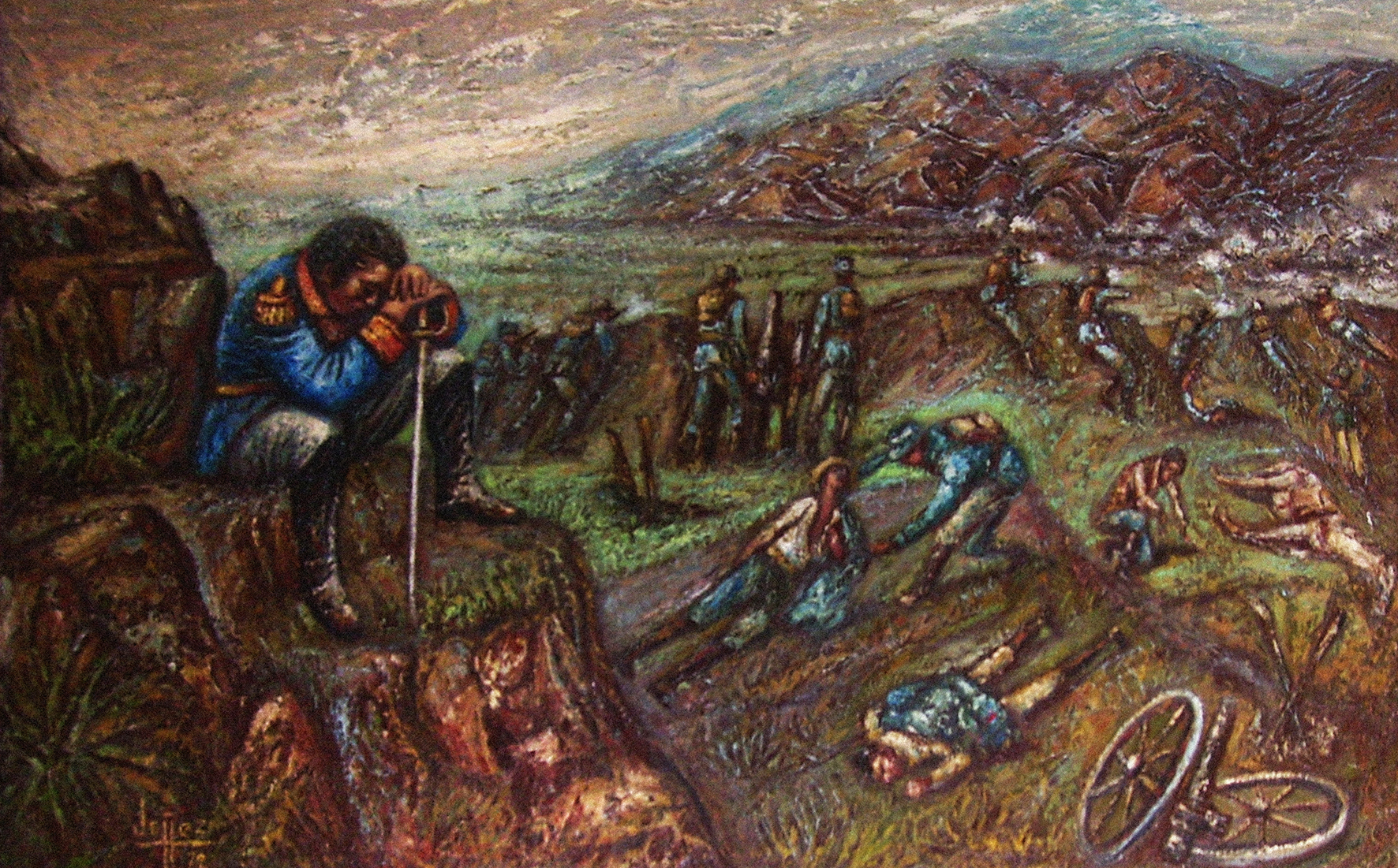 Composición simbólica de la Batalla de Bomboná, hecha en espátula por José E. Ordoñez. Colección Museo de Historia Nariñense "Juan Lorenzo Lucero". (Pasto, Nariño)